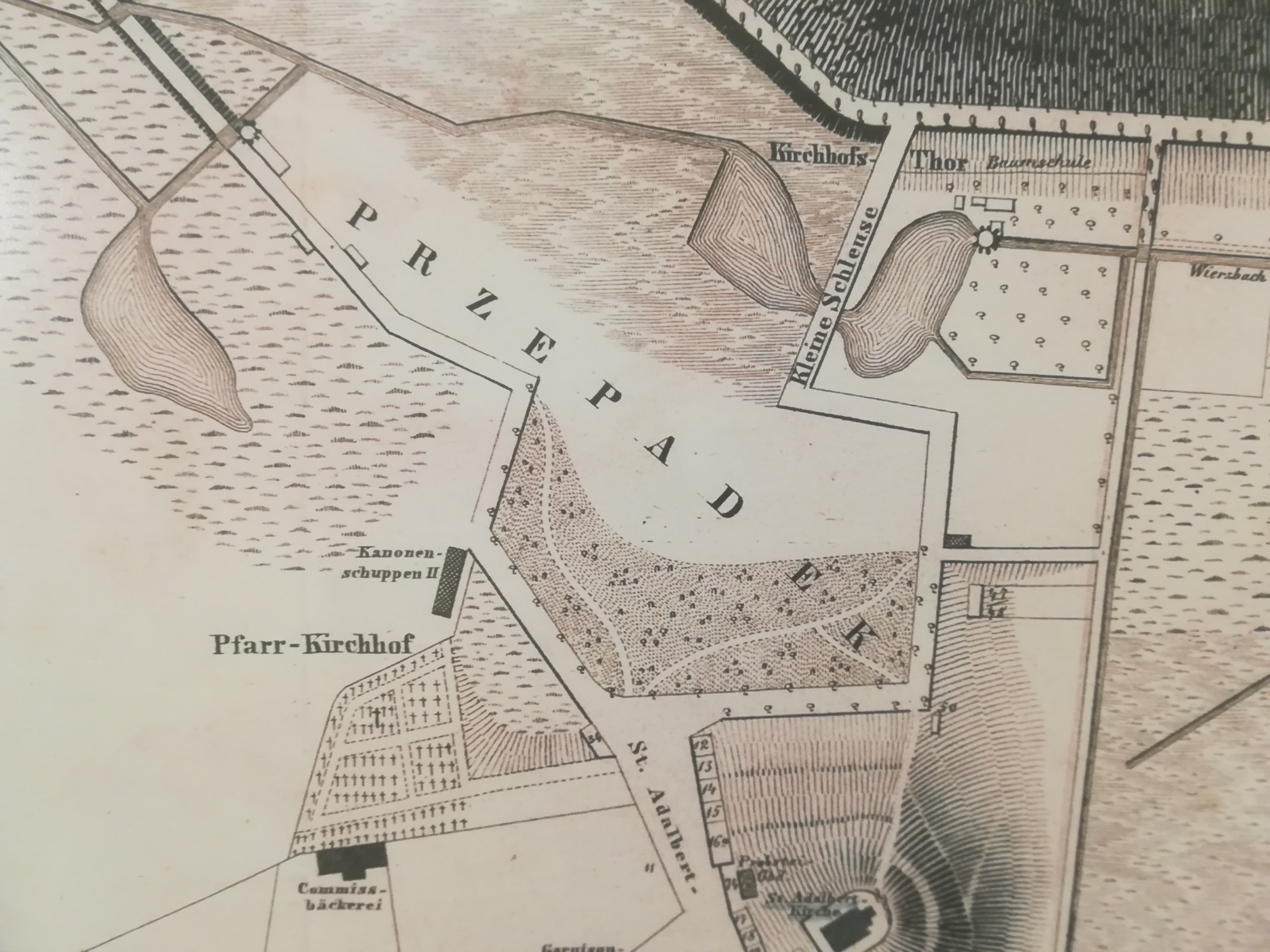 Rejon Przepadku i Cm. Zasł. Wielkopolan w Poznaniu - 1856 r.